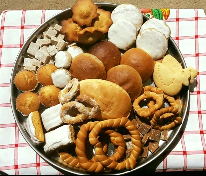 Pan de cajetilla, roscas, rosquillas, alfajores, entre otros productos preparados en hornos de leña por los moradores de la parroquia Malvas.